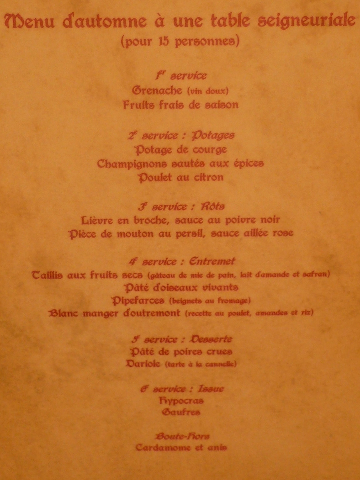 Menu typique seigneurial au Moyen-Âge